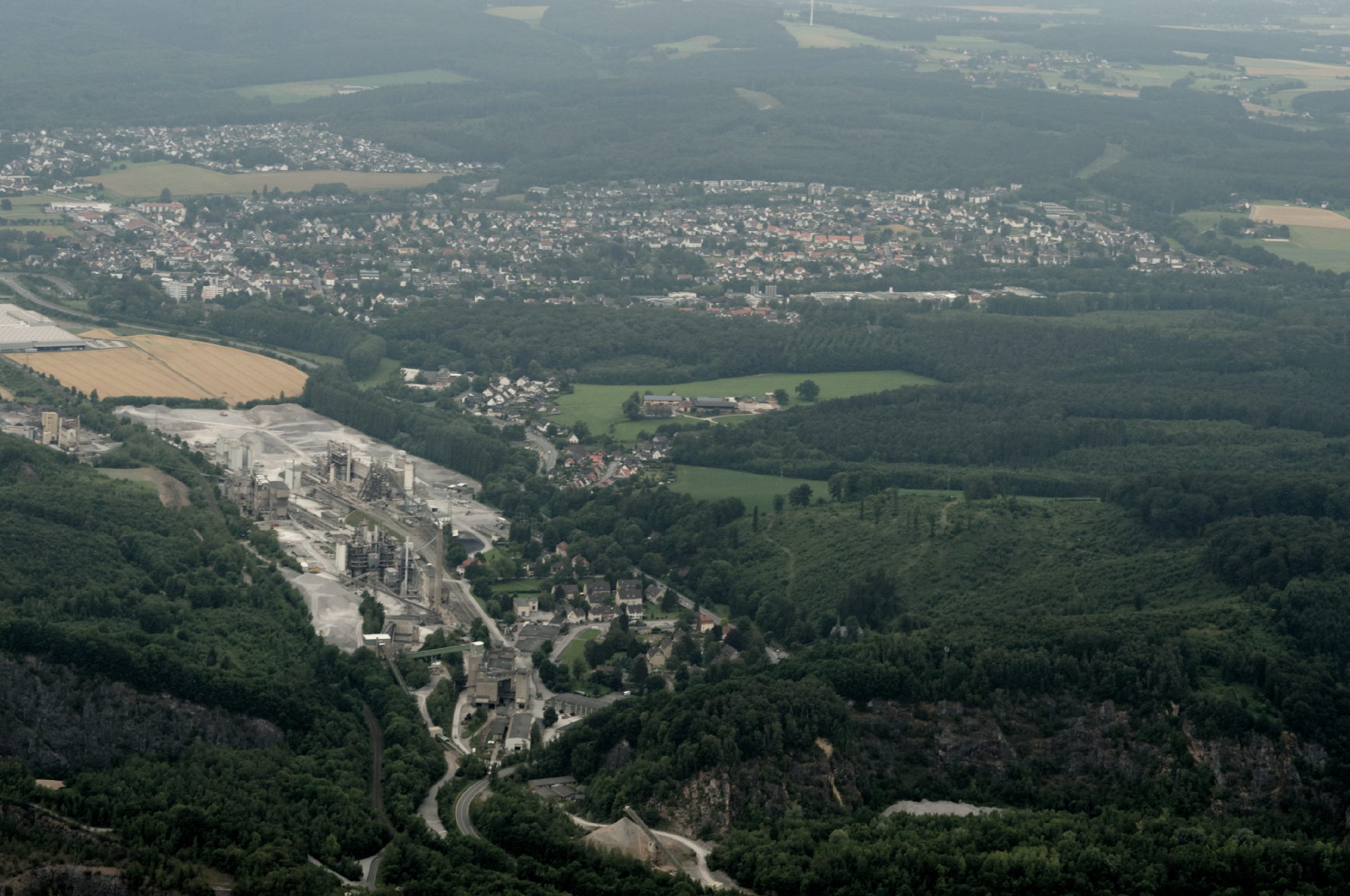 Fotoflug Sauerland Nord. Menden (Sauerland): Kalkwerk der Fa. Rheinkalk bei Oberrödinghausen, Kalksteinklippen im Hönnetal, Bundesstraße 515, oben Lendringsen, Blickrichtung Nord The making of this document was supported by the Community-Budget of Wikimedia Germany.